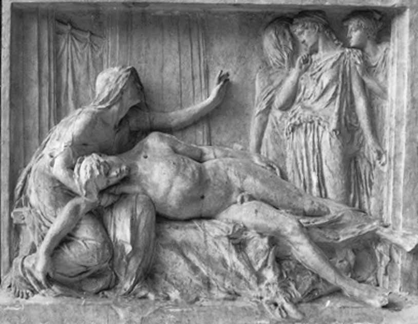 Lucienne Heuvelmans (1881-1944), Électre veillant sur le sommeil d'Oreste, 1911, bas-relief en plâtre, Paris, École nationale supérieure des beaux-arts.